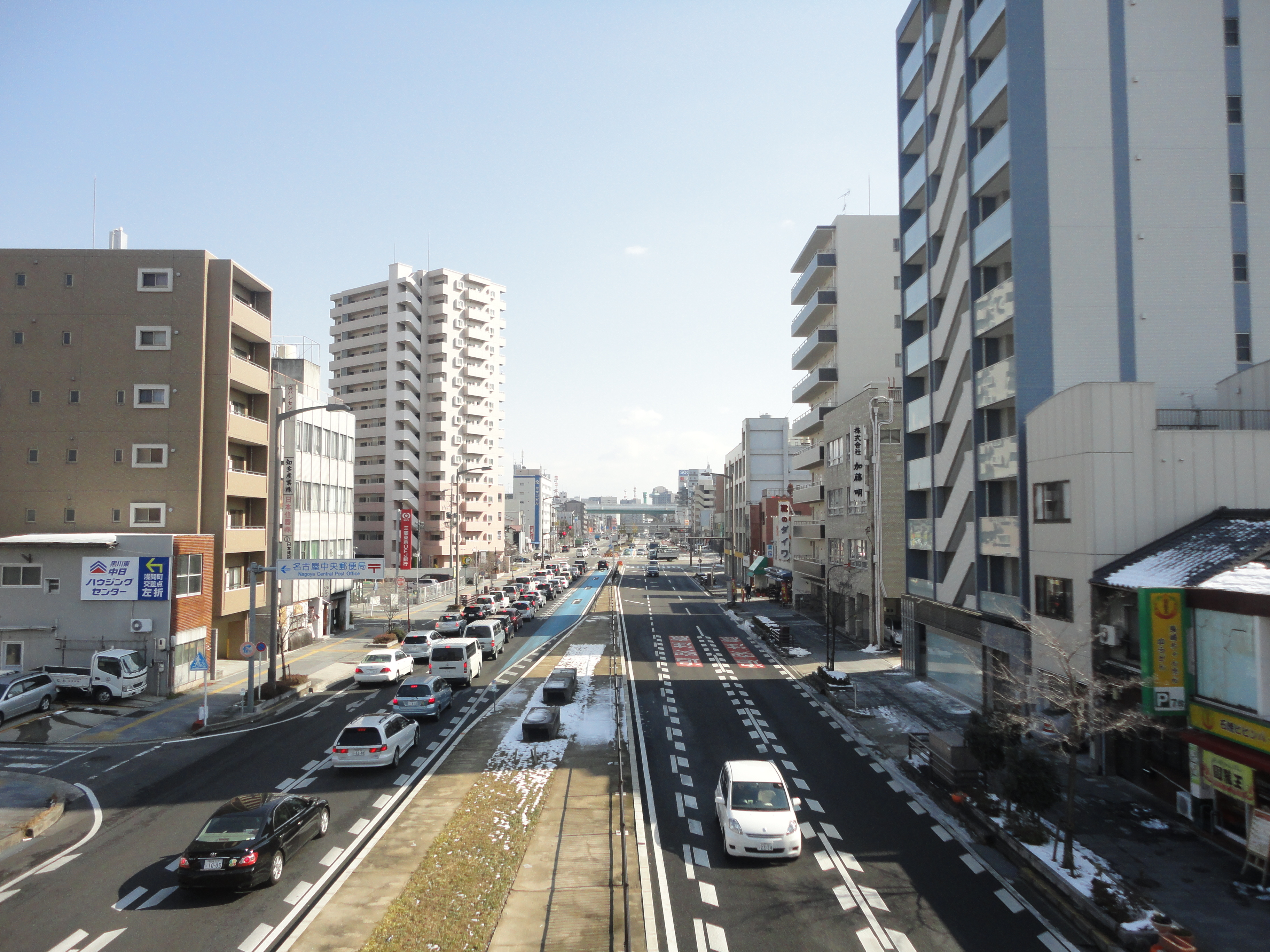 名古屋市西区押切